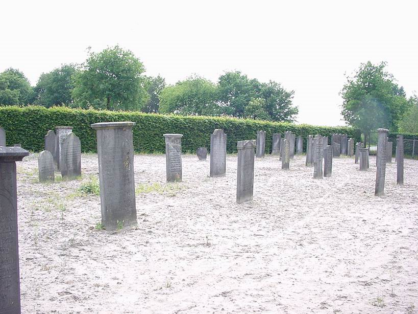 Joodse begraafplaats Geffen